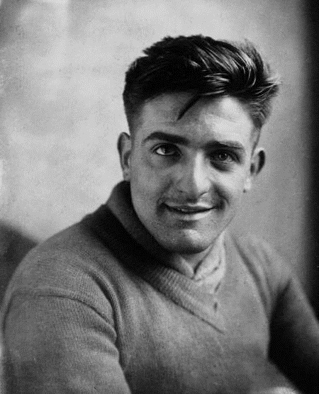 Jules Merviel lors du Tour de France 1929